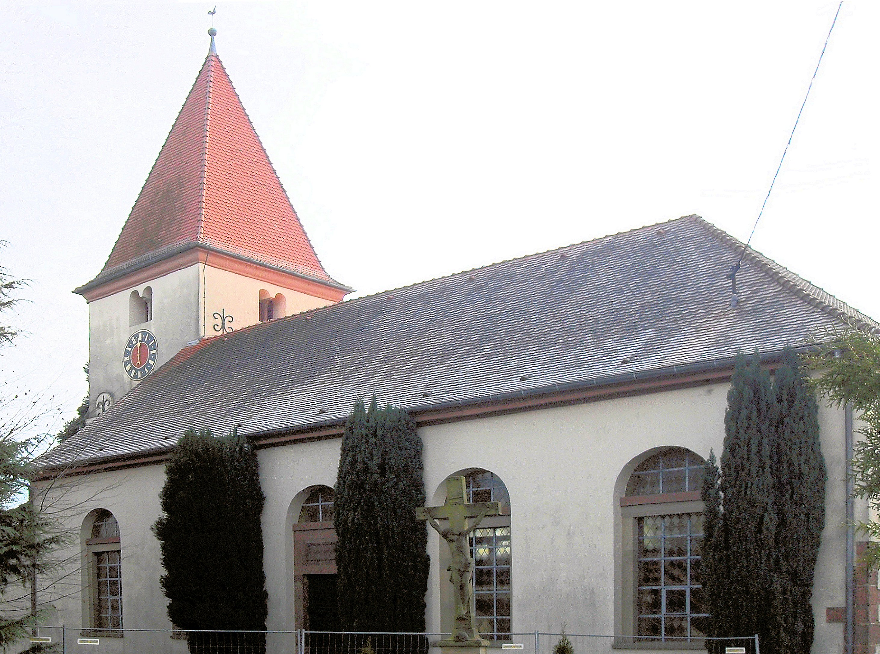 Le temple Protestant de Geudertheim